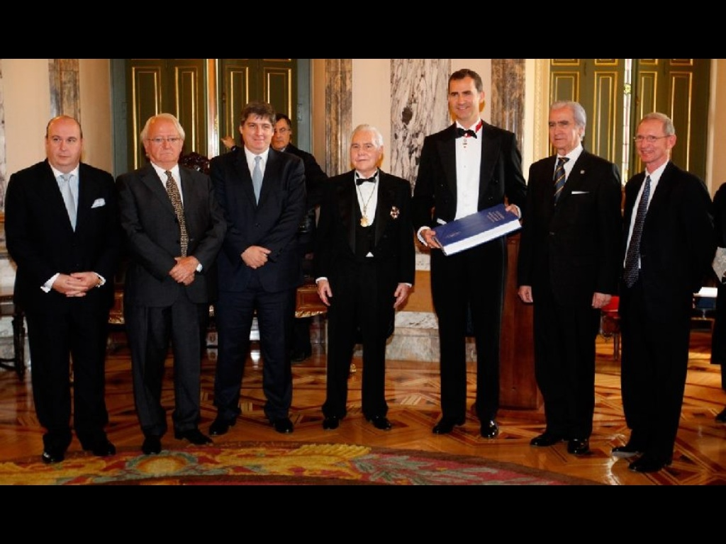 Tribunal Supremo de España en su bicentenario acto presidido por el Principe Felipe de Borbón.